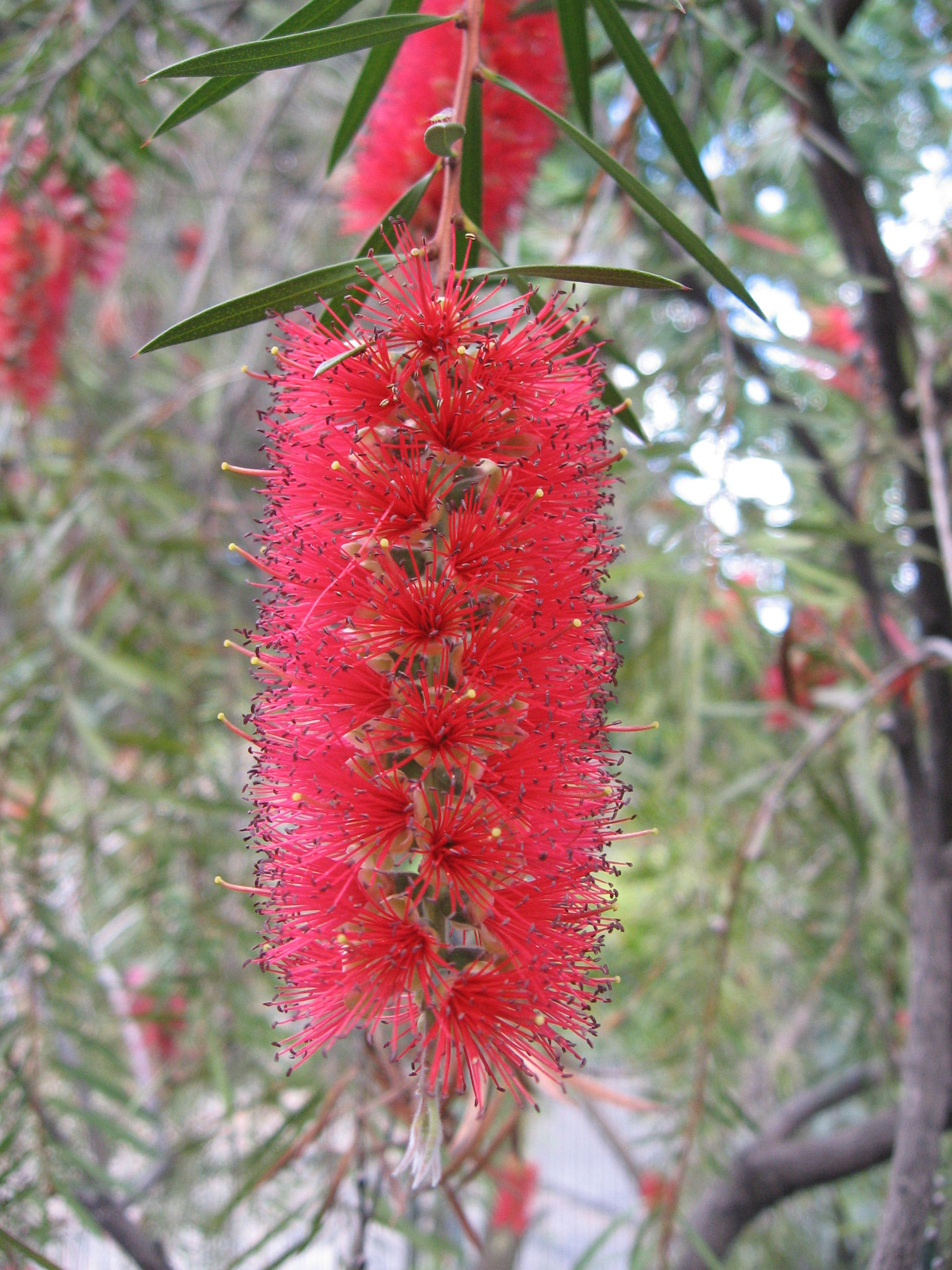 Callistemon pungens. Real Jardín Botánico de Madrid.